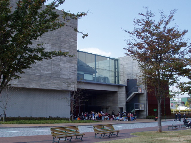 北九州市立いのちのたび博物館